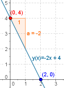 Линеарна функција екс1